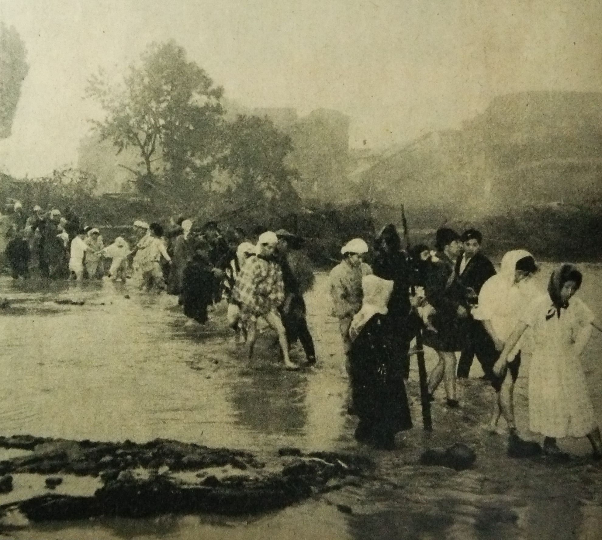 昭和28年西日本水害の際の福岡県朝倉郡原鶴温泉